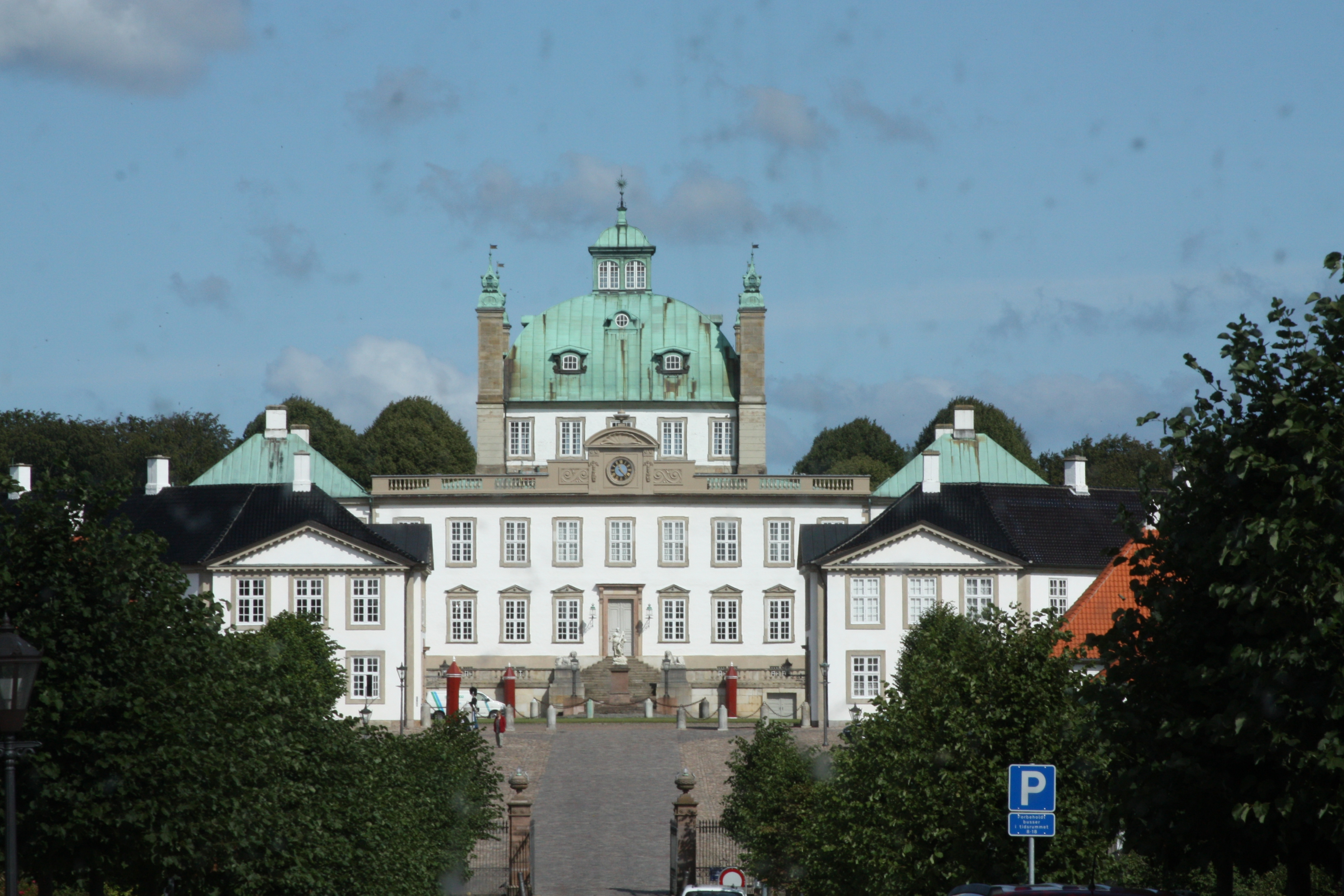 Fredensborg Slot, near Copenhagen, August 2009